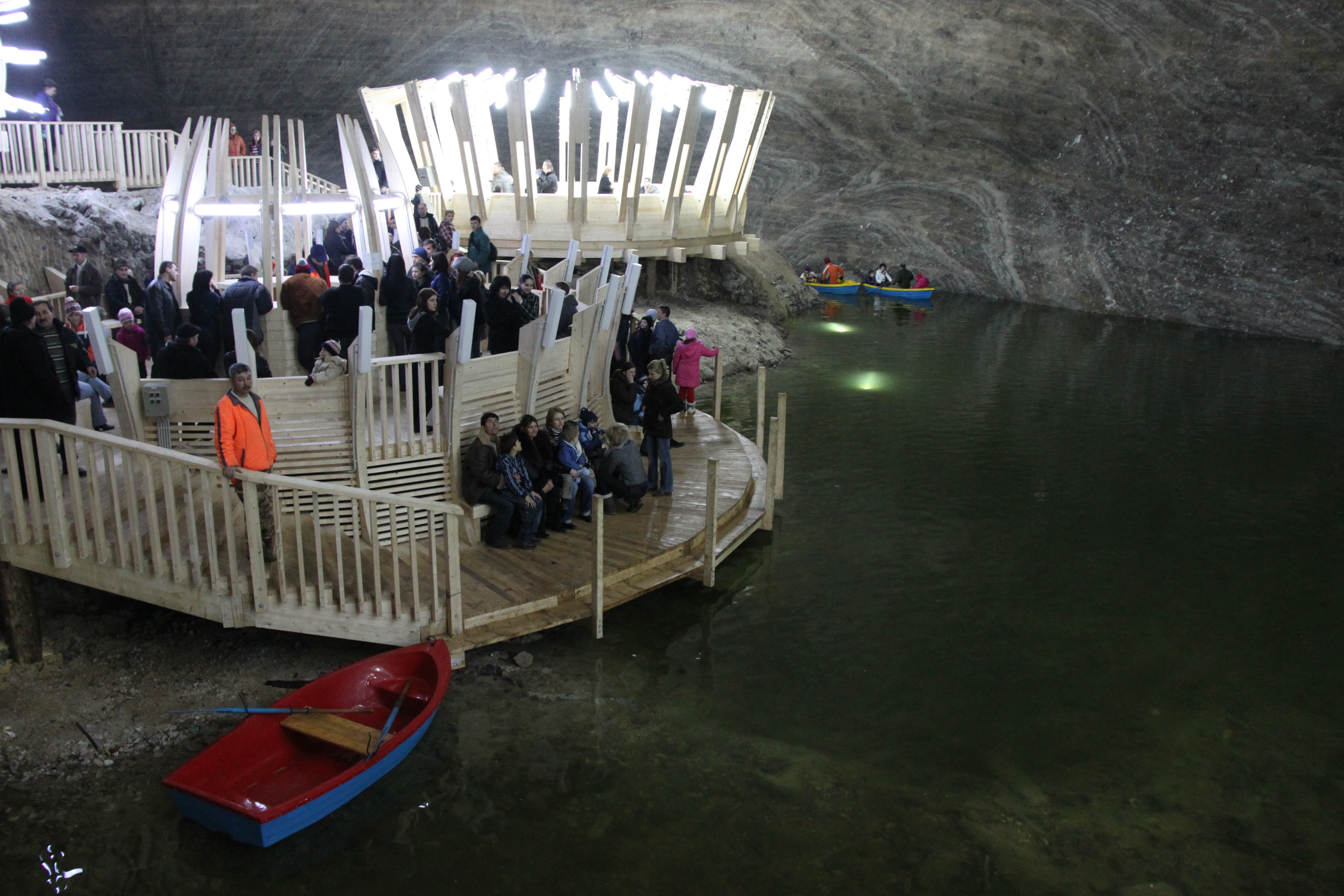 Salina Turda, mina Terezia